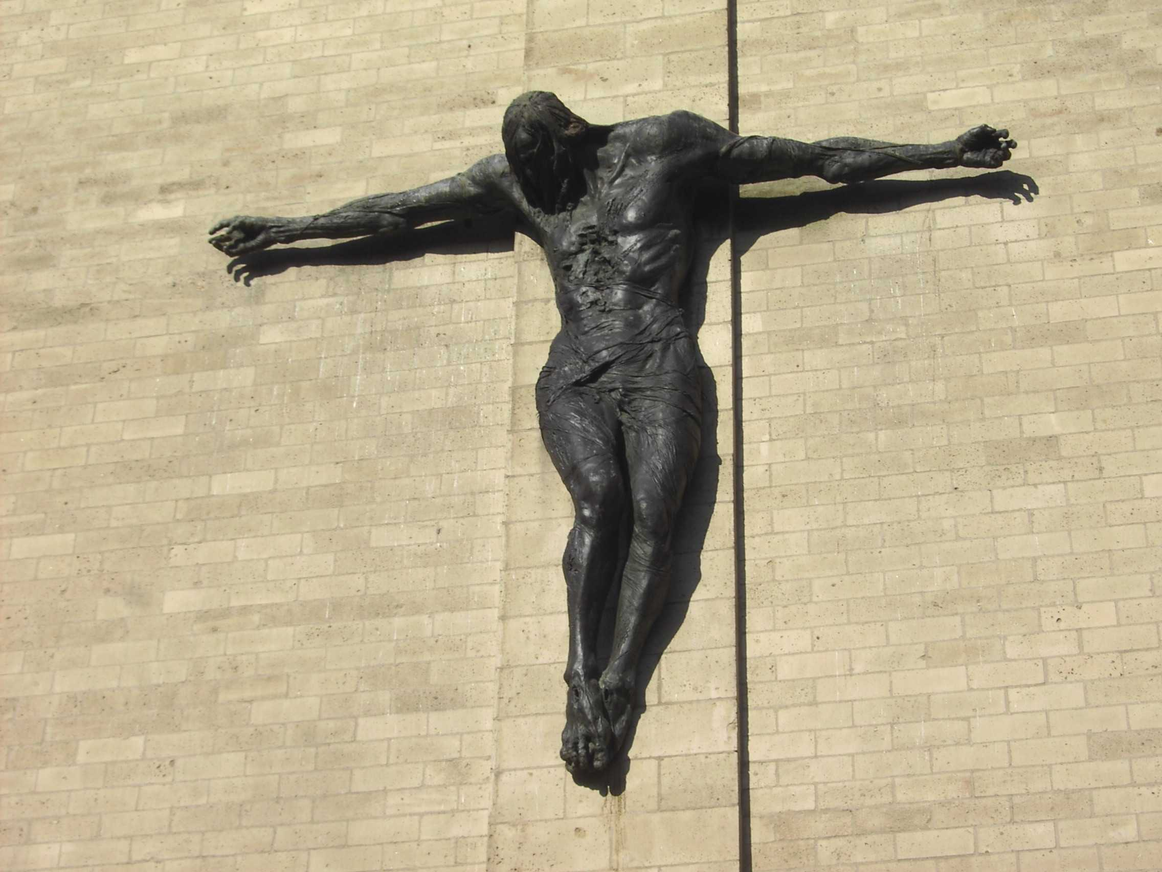 Rochuskirche Düsseldorf, Turm, Christus, Bert Gerresheim